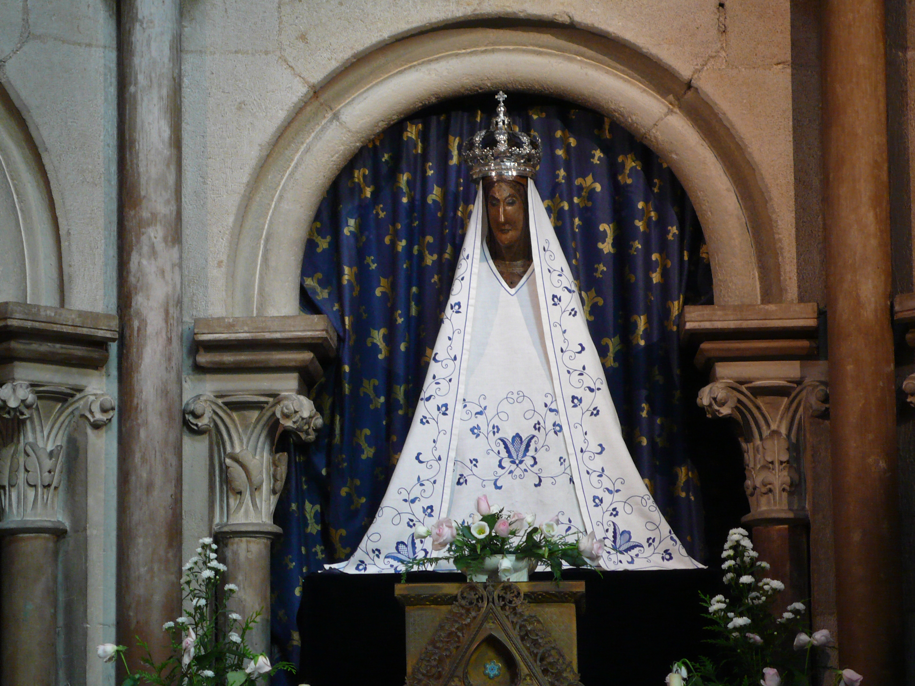 Église Notre-Dame de Dijon, La Vierge noire